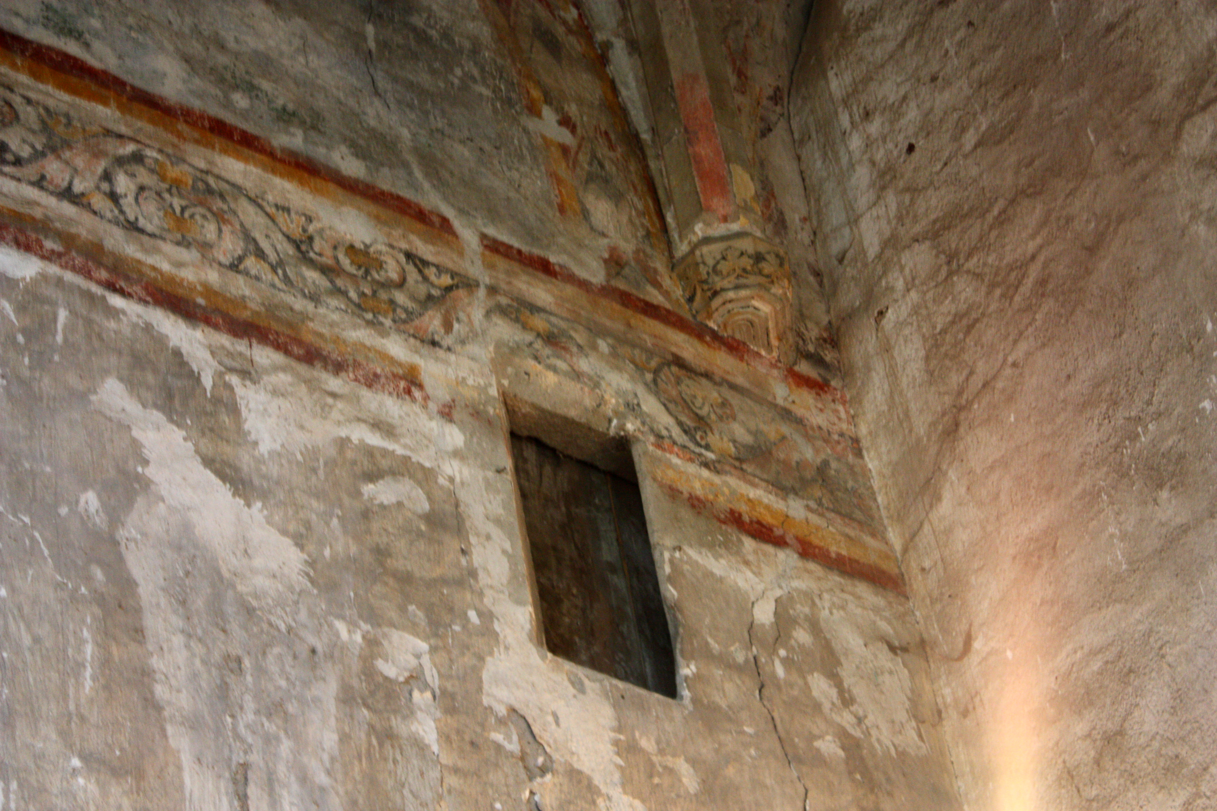 Cette fenêtre à ébrasement oblique, était la fenêtre par laquelle Béatrix de La Tour du Pin, fondatrice de la chartreuse, était autorisée à suivre les offices.